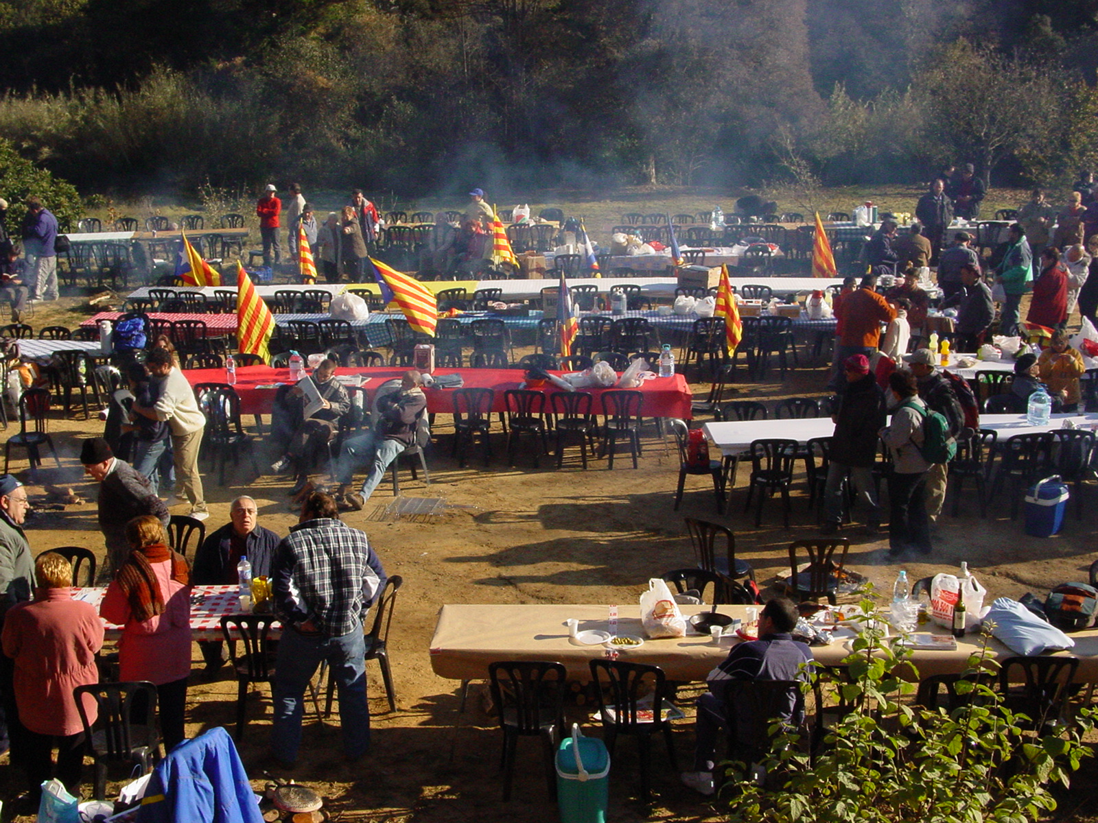 Aplec de Sant Iscle de 2007 a Cerdanyola del Vallès